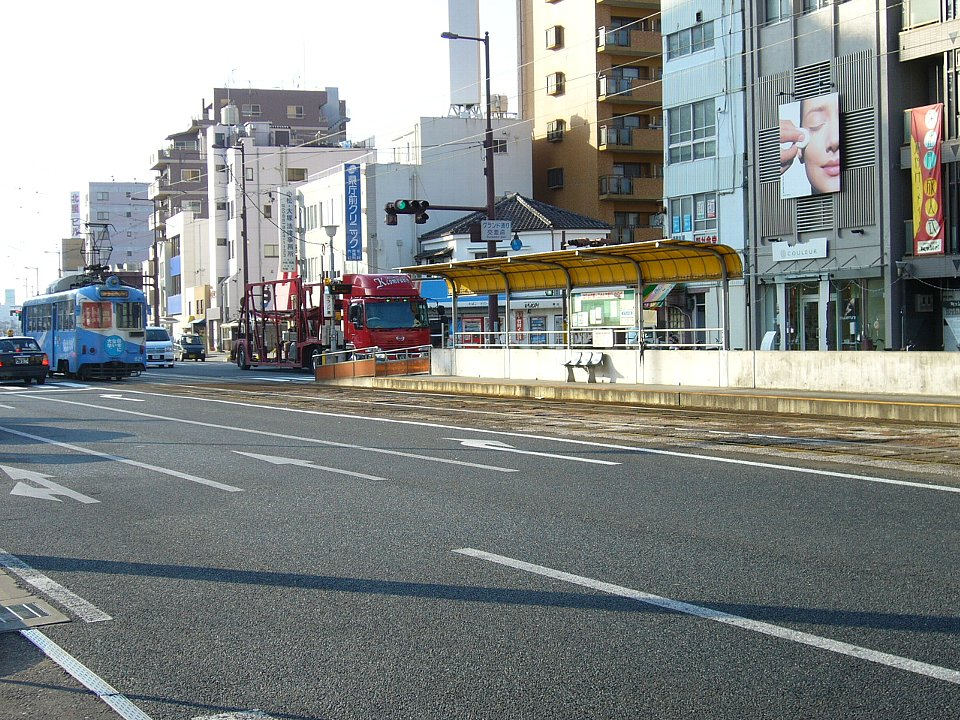 グランド通停留場 はりまや橋方面ホームを北西望